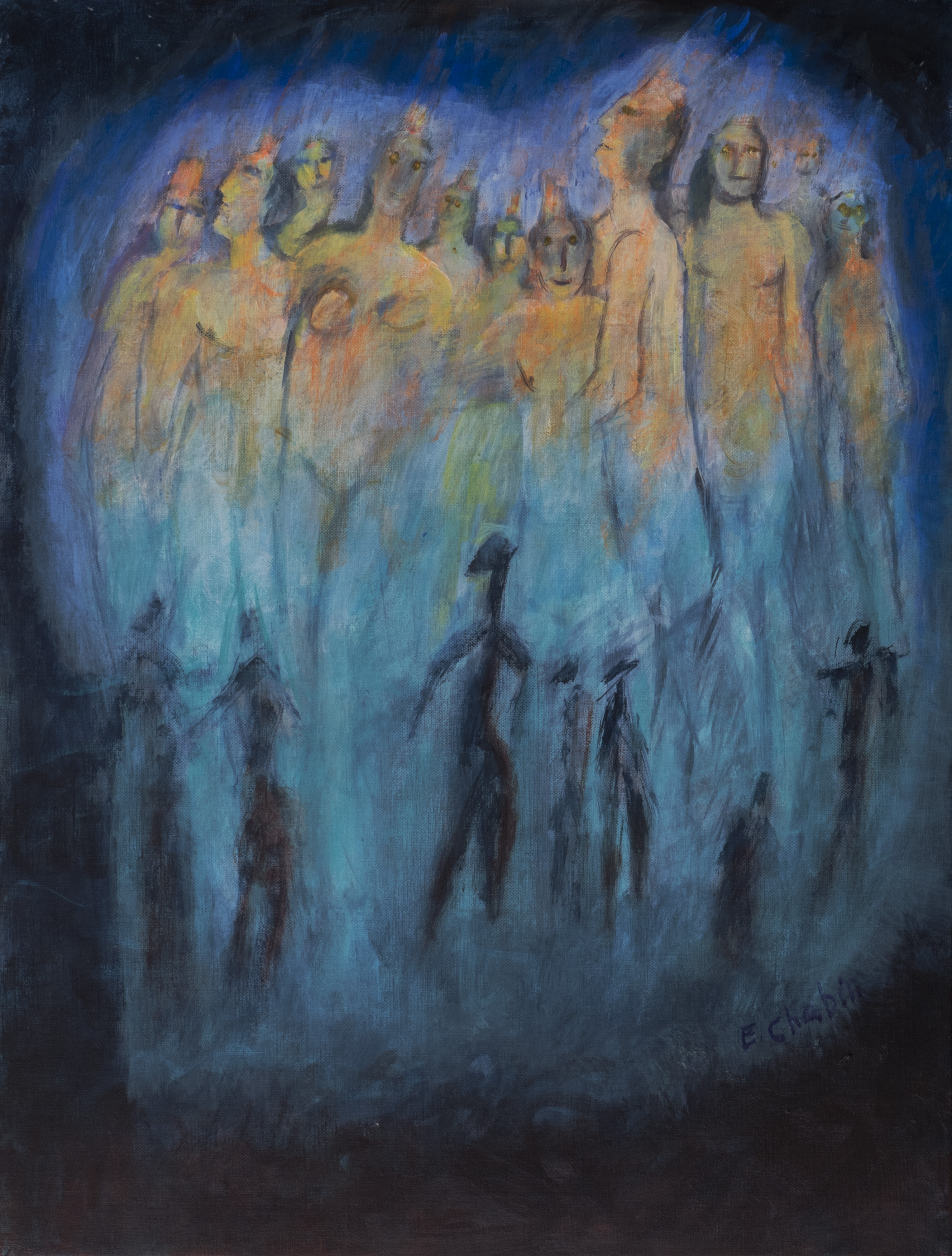 tableau